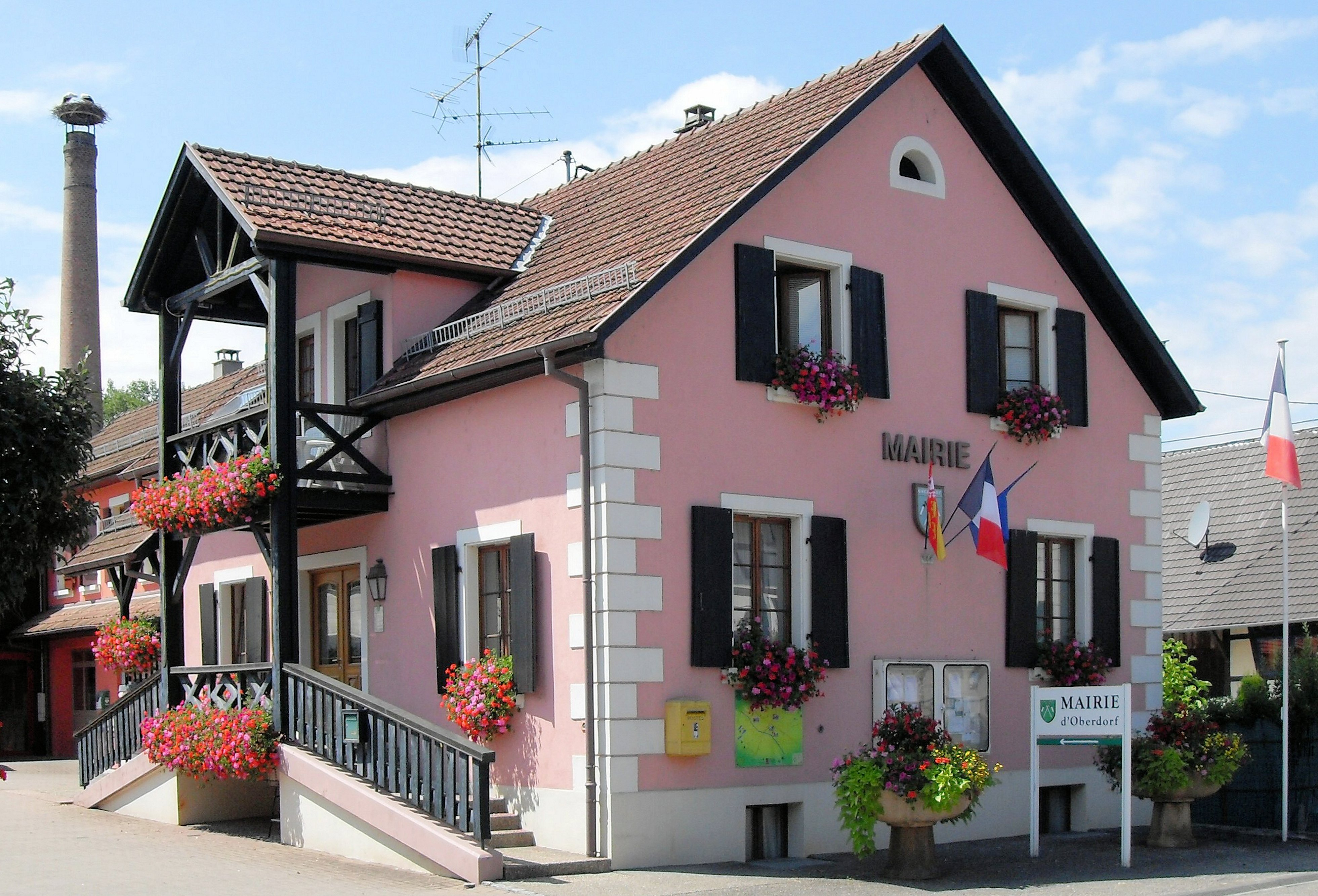 La mairie d'Oberdorf